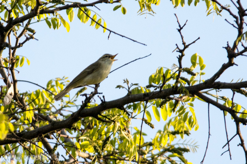 grauwe-fitis-2.jpg